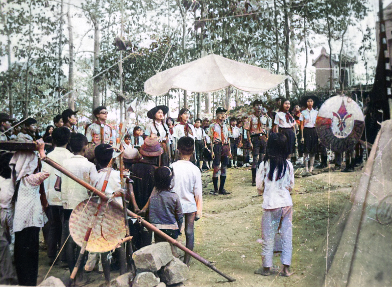 Hướng đạo sinh Long Xuyên (An Giang, Việt Nam) trong một buổi sinh hoạt năm 1965. (Lấy từ và thêm màu).